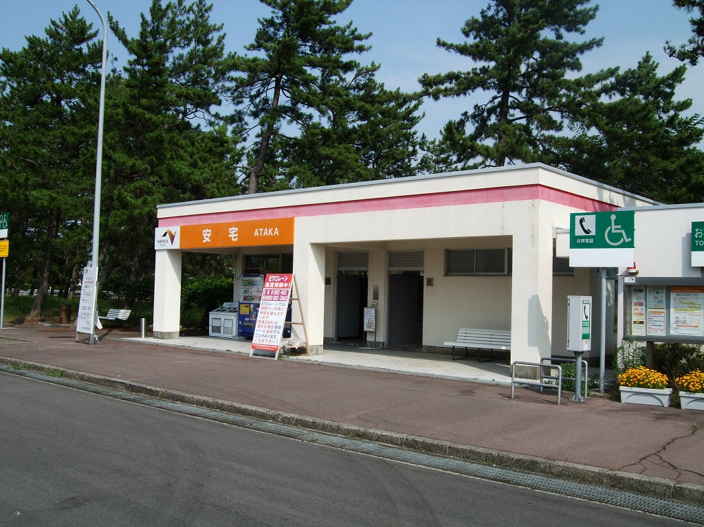 北陸自動車道 安宅パーキングエリア（下り線・新潟方面）